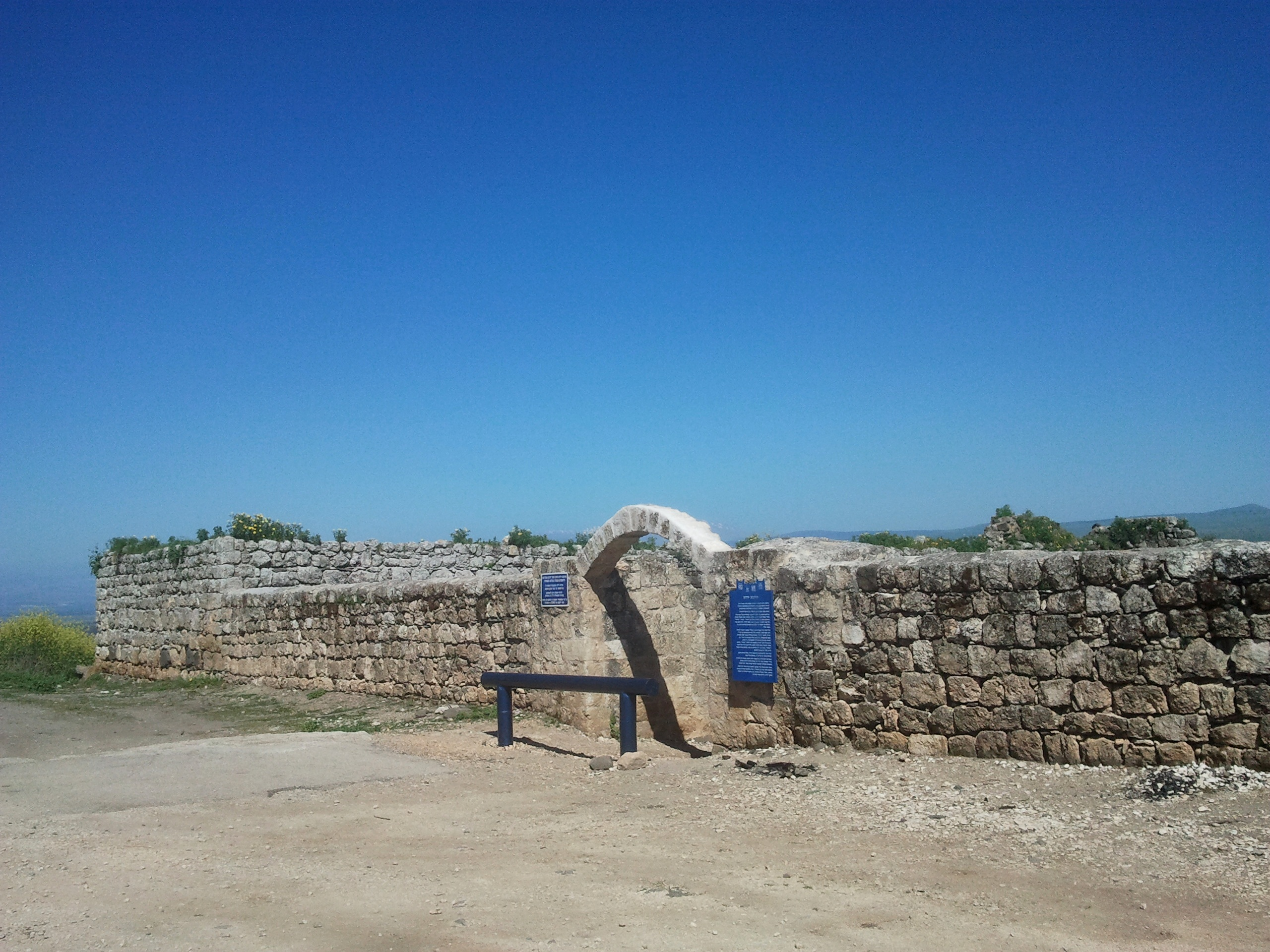 חירבת ירדה היא אתר ארכאולוגי ואתר הנצחה על שלוחה של רמת כורזים